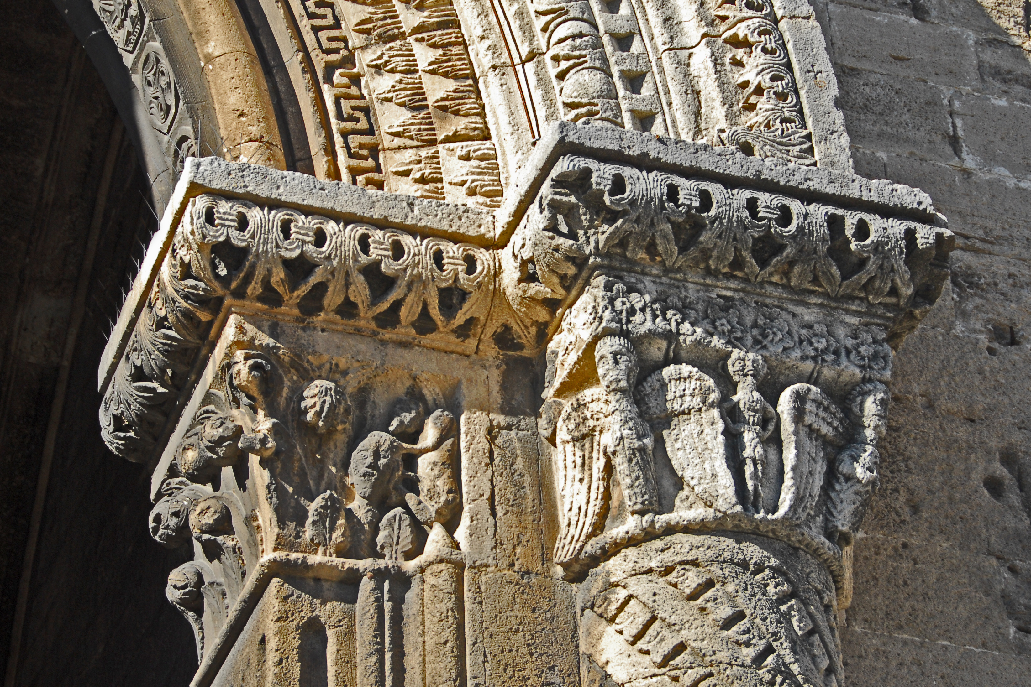 N-D-du-Lac du Le Thor, Kapitelle an Vorhalle